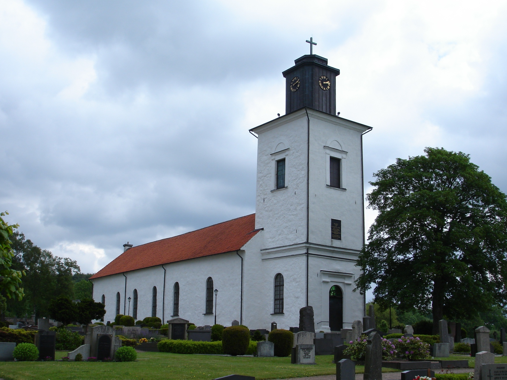 Västra Karups kyrka på Bjärehalvön, i Båstads kommun